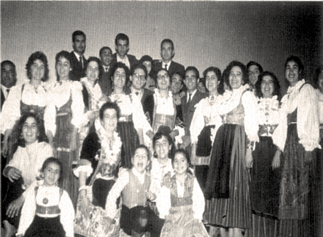 Tony Piaceri insieme al gruppo folk Santa Barbara, alla fine di una partecipazione alla trasmissione televisiva RAI Sardegna nel 1957